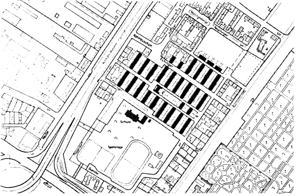 Lageplan der Siedlung "Alte Haide" in München, 1918 von Architekt Theodor Fischer (1862-1938)